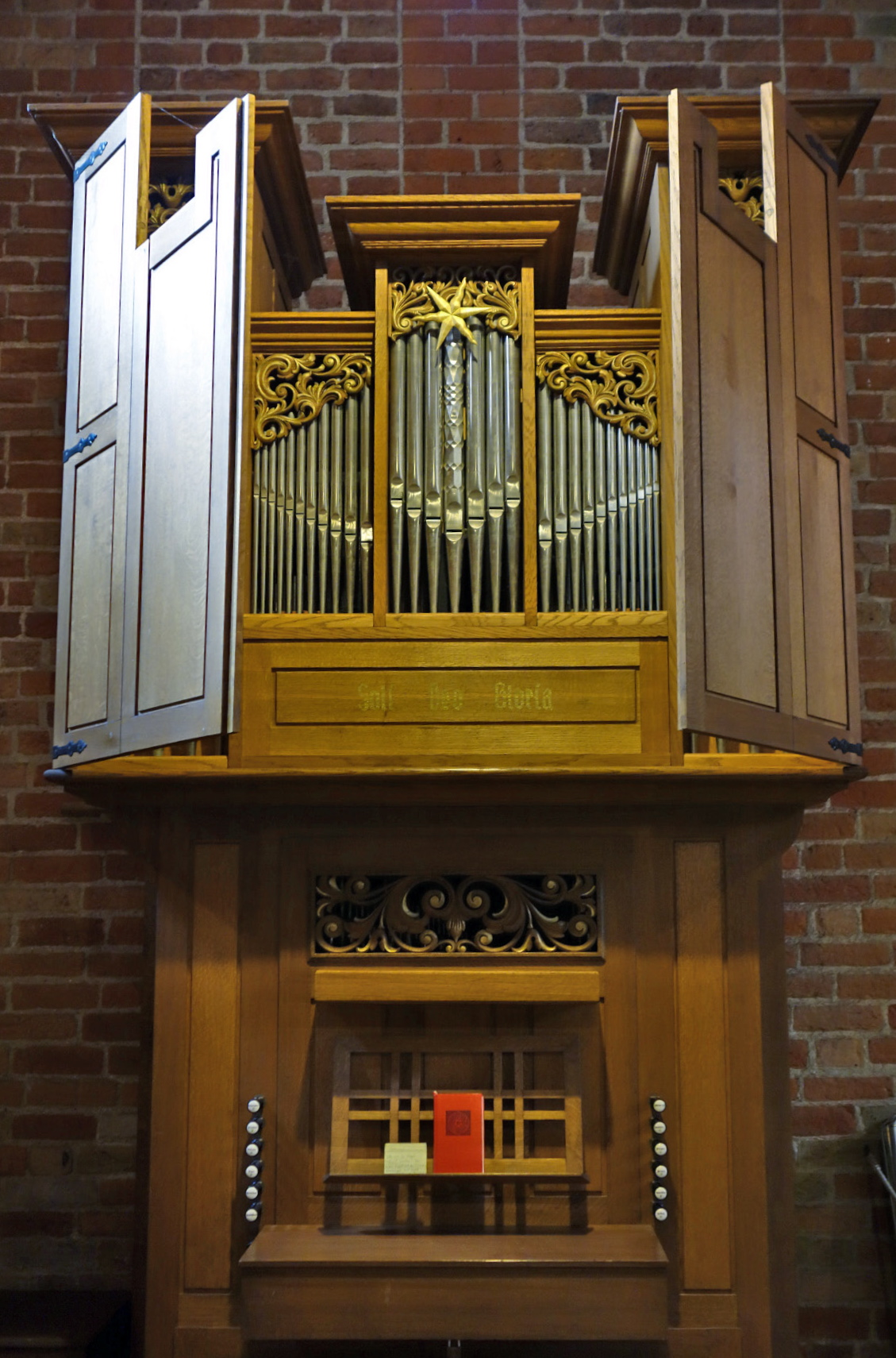 Orgel im Ratzeburger Dom, Schleswig-Holstein